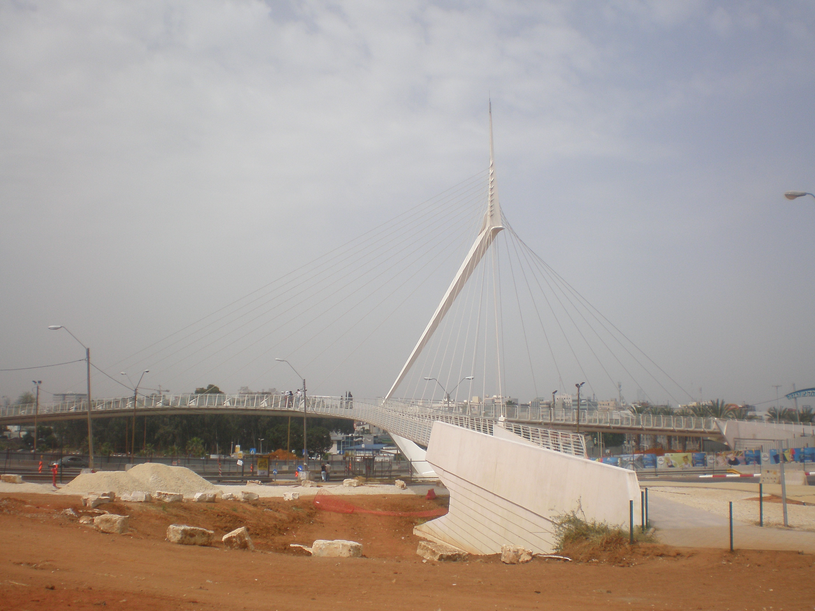 Calatrava Bridge, Petah Tikva, Israel